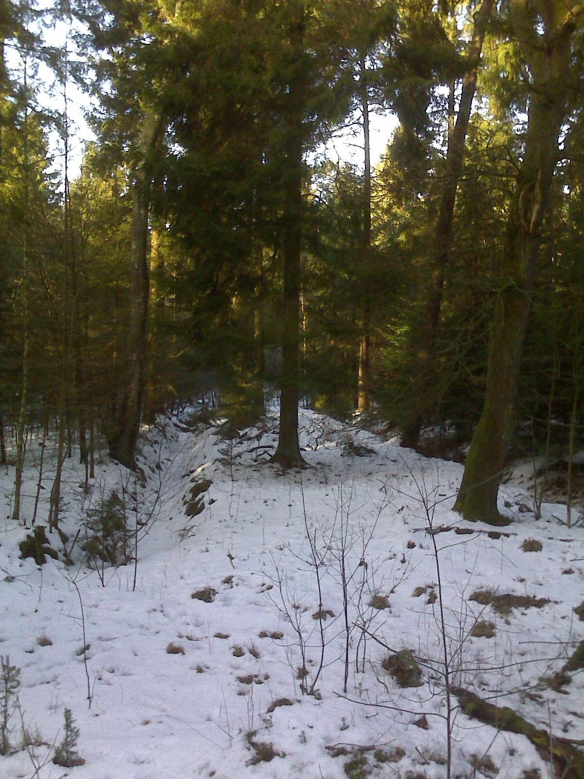 Emeis-Kultur (Rabattenkultur nach Emeis) im Forst Iloo zwischen Aukrug und Timmaspe, sie wurden 1878-1880 von Strafgefangenen angelegt